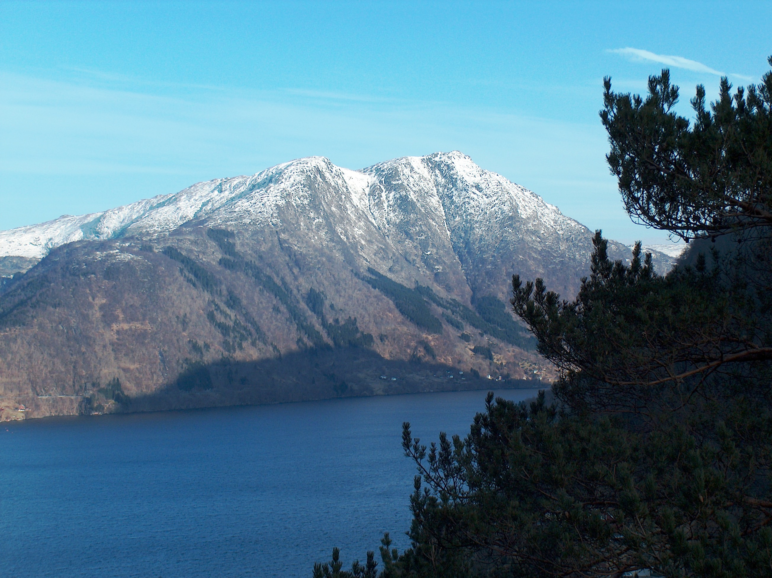 Bruviknipa, Osterøy in Norway